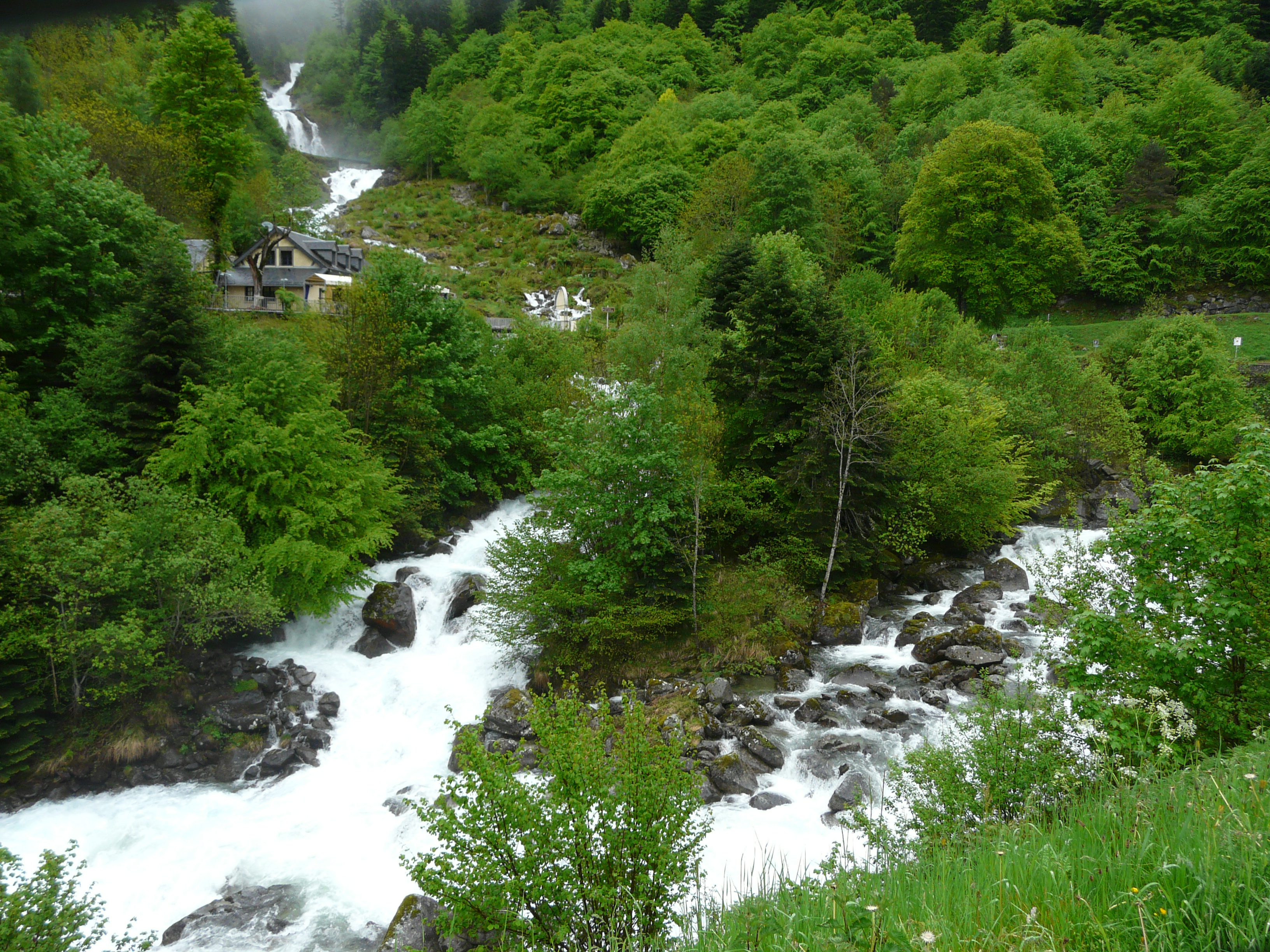 En partie aval du gave de Lutour, la cascade du Lutour à la Raillère, Cauterets, Hautes-Pyrénées, France. Au premier plan sur la droite, le gave de Jéret rejoint le gave de Lutour.